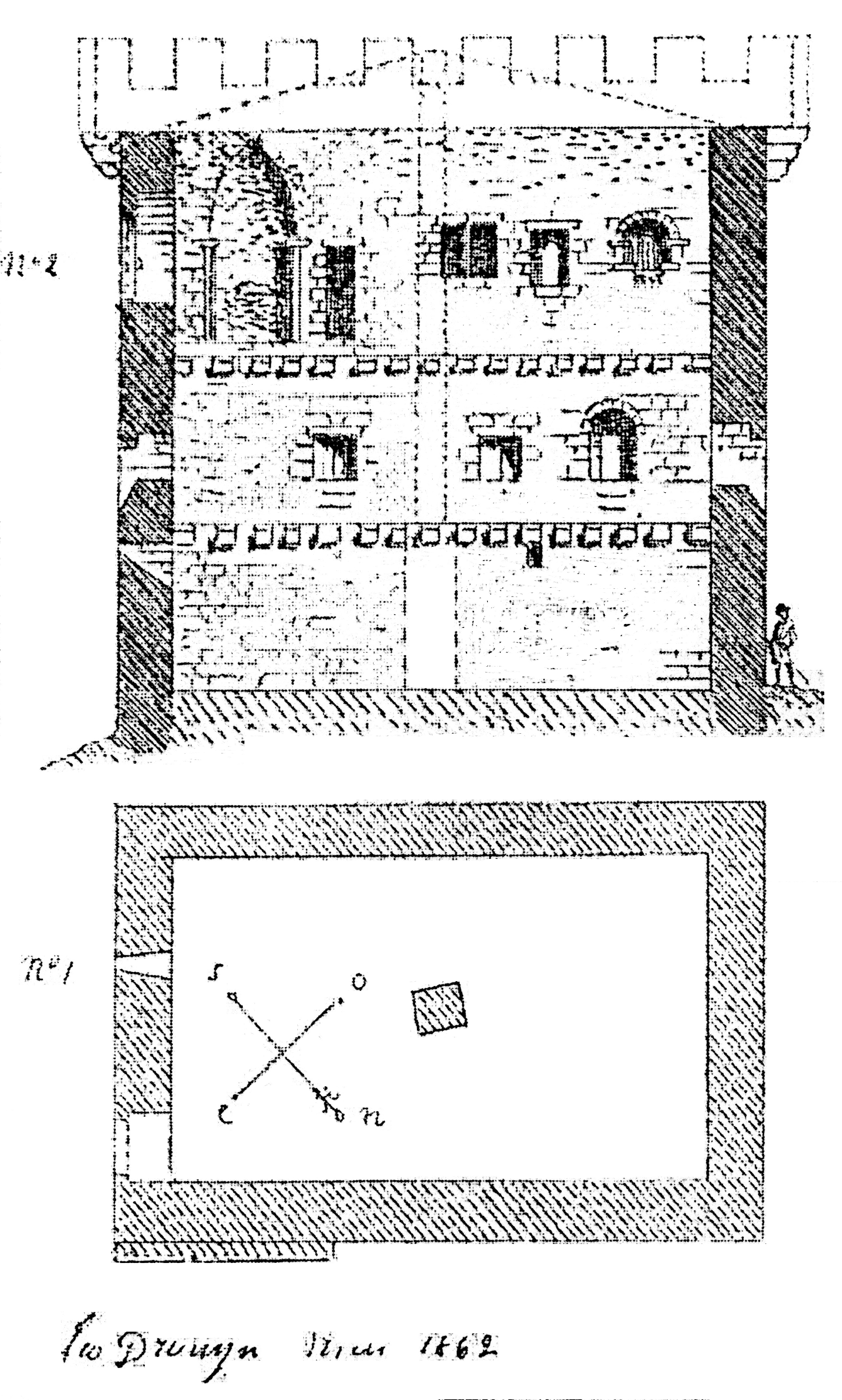 Moulon Tour d'Ansouhate (Drouyn 1863)